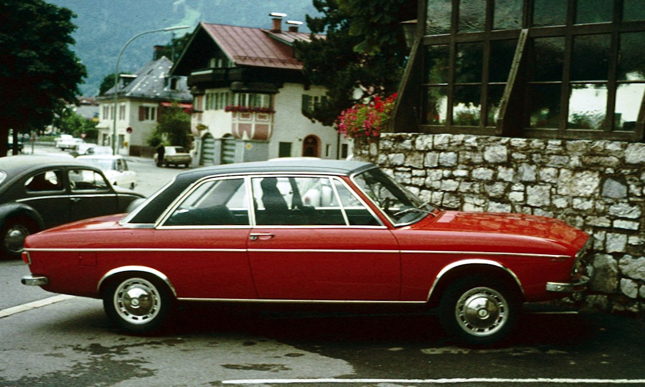 Audi 100 C1 2 door sedan outside Husar in Garmisch